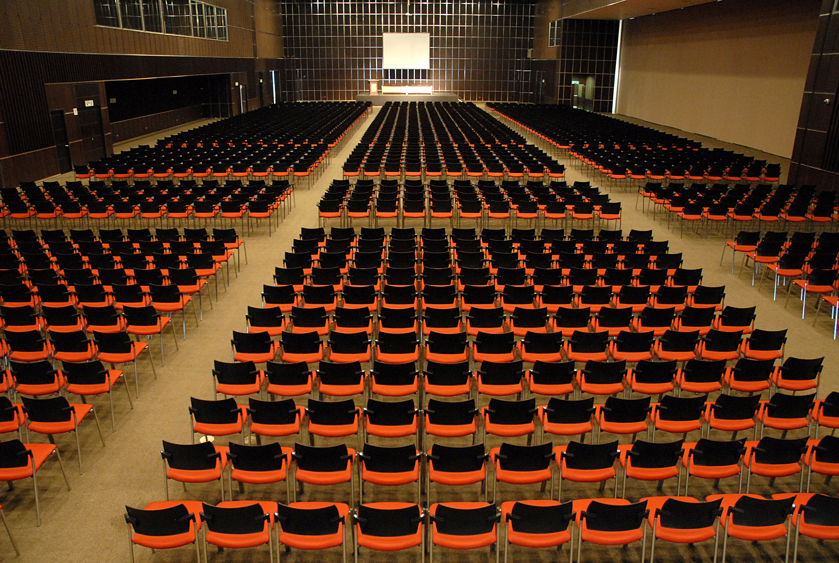 Salon Rosita Jaluf